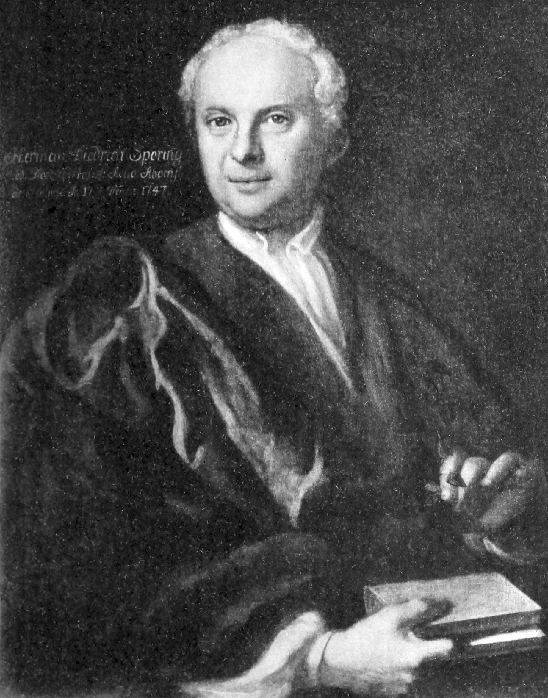 Herman Spöring den äldre (1701-1747). Något äldre man, bröstbild, fas, hufvudet t. h., håller i högra handen en bok, i den venstra en ört. Han har blå ögon, mörka ögonbryn, kal panna, hvitt uppkam-madt hår. Skjorta med uppstående linning, oknäppt, vida skjortärmar med smal linning, rödbrun rock utan krage, oknäppt, rödt draperi öfver högra axeln och sidan. Mörk bakgrund, t. h. står Herman Diedrich Spöring Med. Doct. et Profess. Acad. Aboens. Nat Holmiæ AM701 Denat. 1747. Olja på duk, 74x65 ctm., af Georg Engelhardt Schröder. Medicinalstyrelsen. Enligt Collegii Medici kassabok betaltes 1756 9/n “Contre Feijaren Streng för en ört, han målat på doct. Spörings portrait" 24 dir kmt. Eich. o 67.